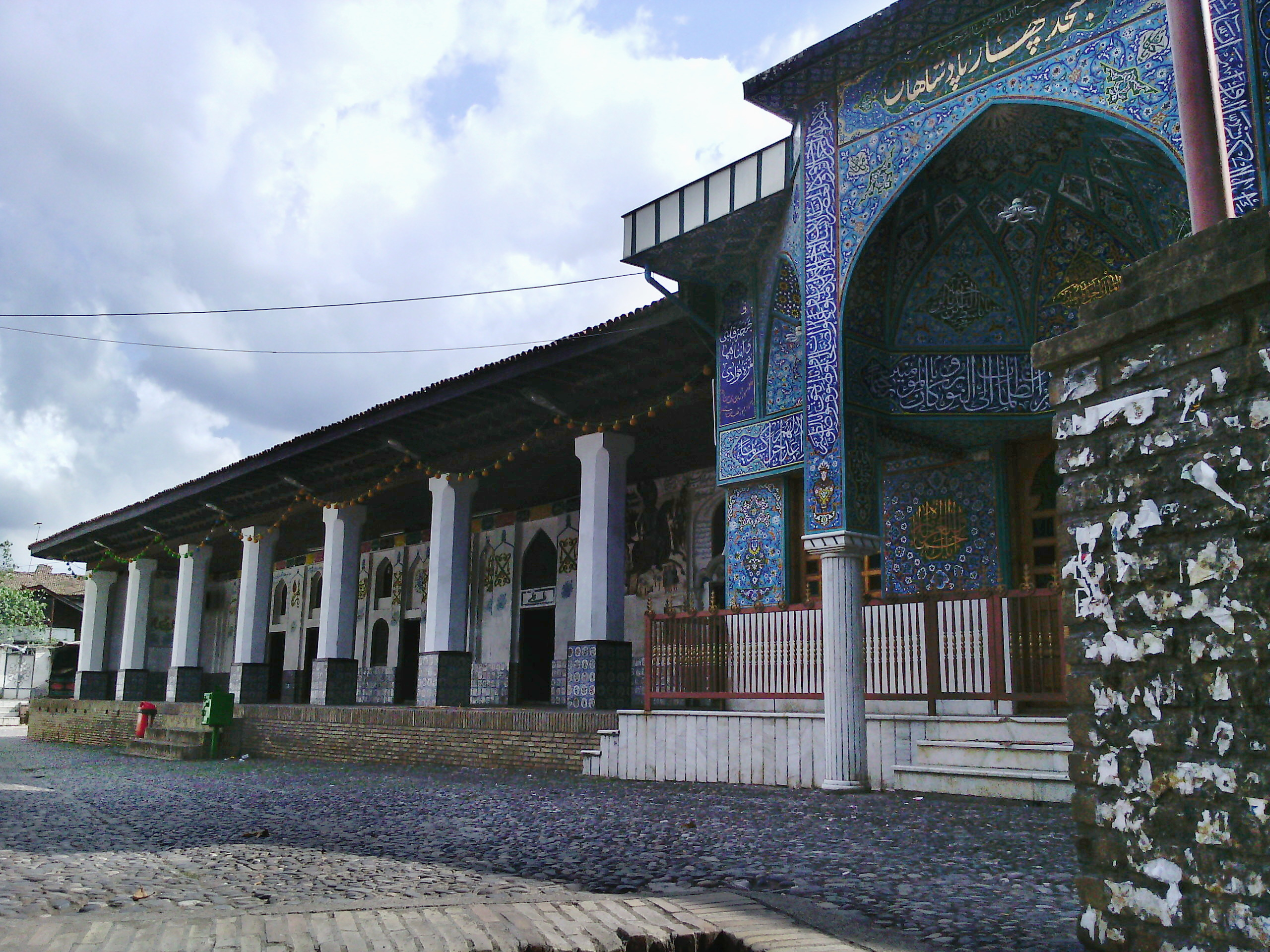 بنای چهار پادشاه